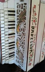 Harmonia pedałowa prod. Ignacy Mielnicki